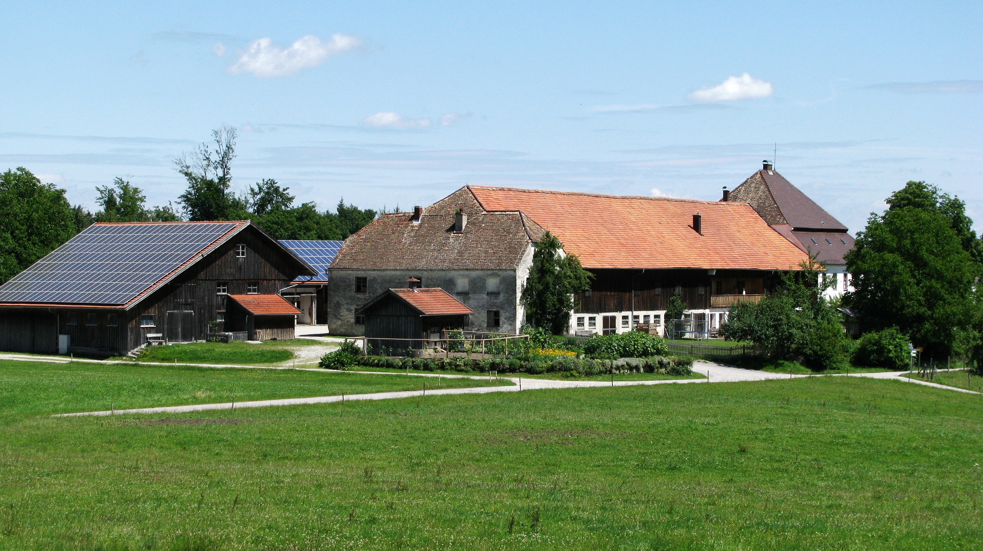 Gut Grasleiten, ehemaliger Schwaighof des Klosters Polling, Wohnhaus mit Mansardwalmdach, 1744 und Folgejahre, im Kern wohl älter. - Zugehöriges Nebengebäude, zweigeschossig mit Schopfwalmdach, Ende 18. Jahrhundert, mit späteren Veränderungen. This is a photograph of an architectural monument.